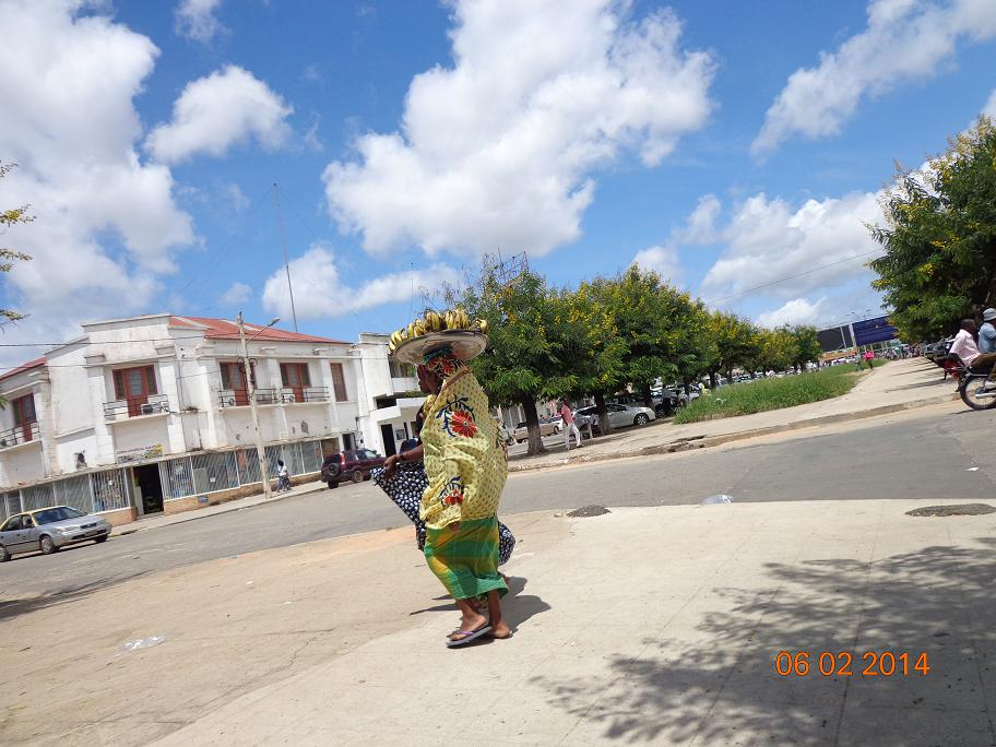 Nampula e Mulheres